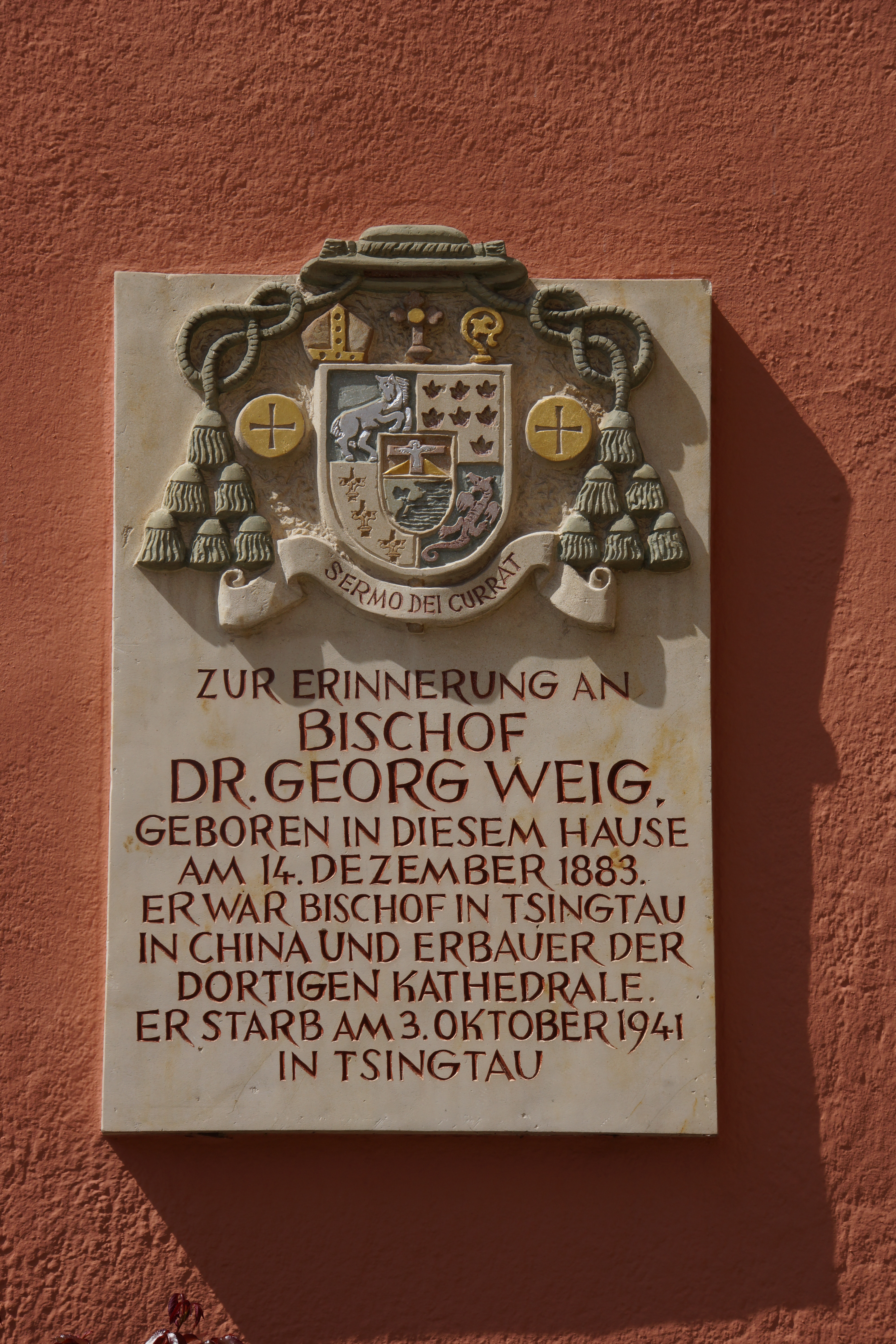 Der Markt Beratzhausen in der Oberpfalz